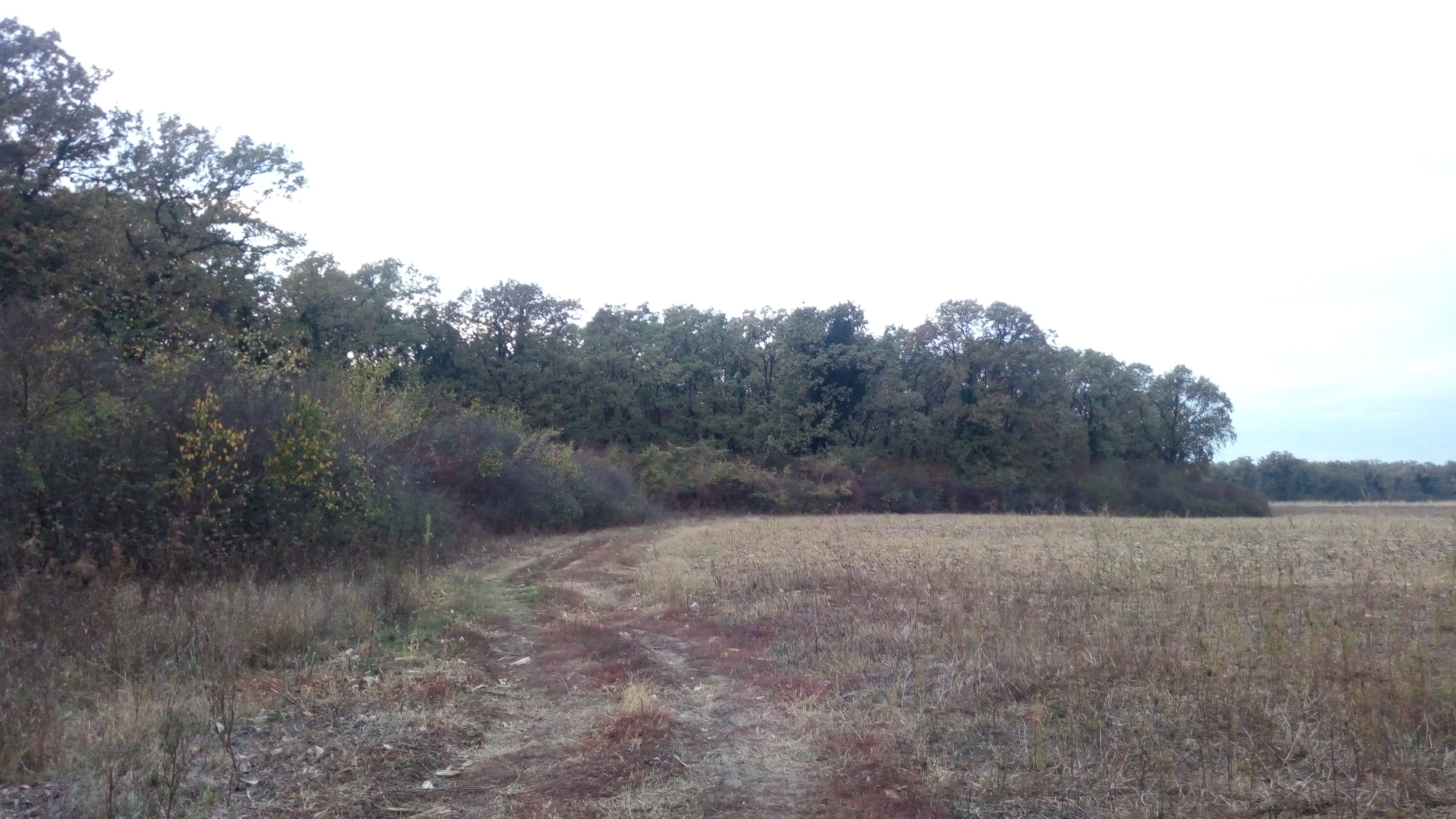 Шума Гибавац.